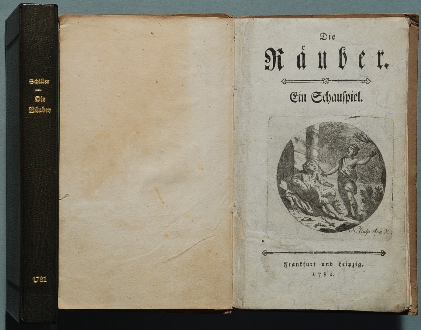 Schiller, Friedrich: Die Räuber. Ein Schauspiel. Frankfurt und Leipzig [vermutlich Stuttgart, Metzler] 1781, Titel + 1 Blatt Personenzettel + 12 n. pag. Seiten Vorrede + 222 Seiten, Titel- und Schlussvignette, W./G.² 3 Erstausgabe (Erstdruck); Buchdeckel 17 x 10 cm; auf dem Vorsatz rechts oben handschriftlicher Besitzervermerk des Goetheforschers "Gustav von Löper, Unruhstadt, 15. Mai 1855" in kleiner Gelehrtenschrift; Identifikation des Druckes: Die Seiten 69, 163 und 204 sind falsch paginiert, zwei Druckfehler auf Seite 65 ("lansch" statt lausch, "grossrr" statt grosser). Ohne Nennung von Autor und Verleger. Gedruckt in einer Auflage von 800 Exemplaren auf Kosten des jungen Schillers, der ein Darlehen von 150 Gulden dafür aufnehmen musste. Wegen des schleppenden Verkaufs als Lesedrama wurde der größere Teil makuliert. Erst die Mannheimer Uraufführung Januar 1782 machte das Stück auf einen Schlag populär. Einer der seltensten Erstdrucke der deutschen Literatur. Provenienz: Sammlung Adam, Auktion Dr. Tenner Heidelberg 03.11.1981, Katalog-Nr. 430 mit Abbildung auf Tafel XVII.